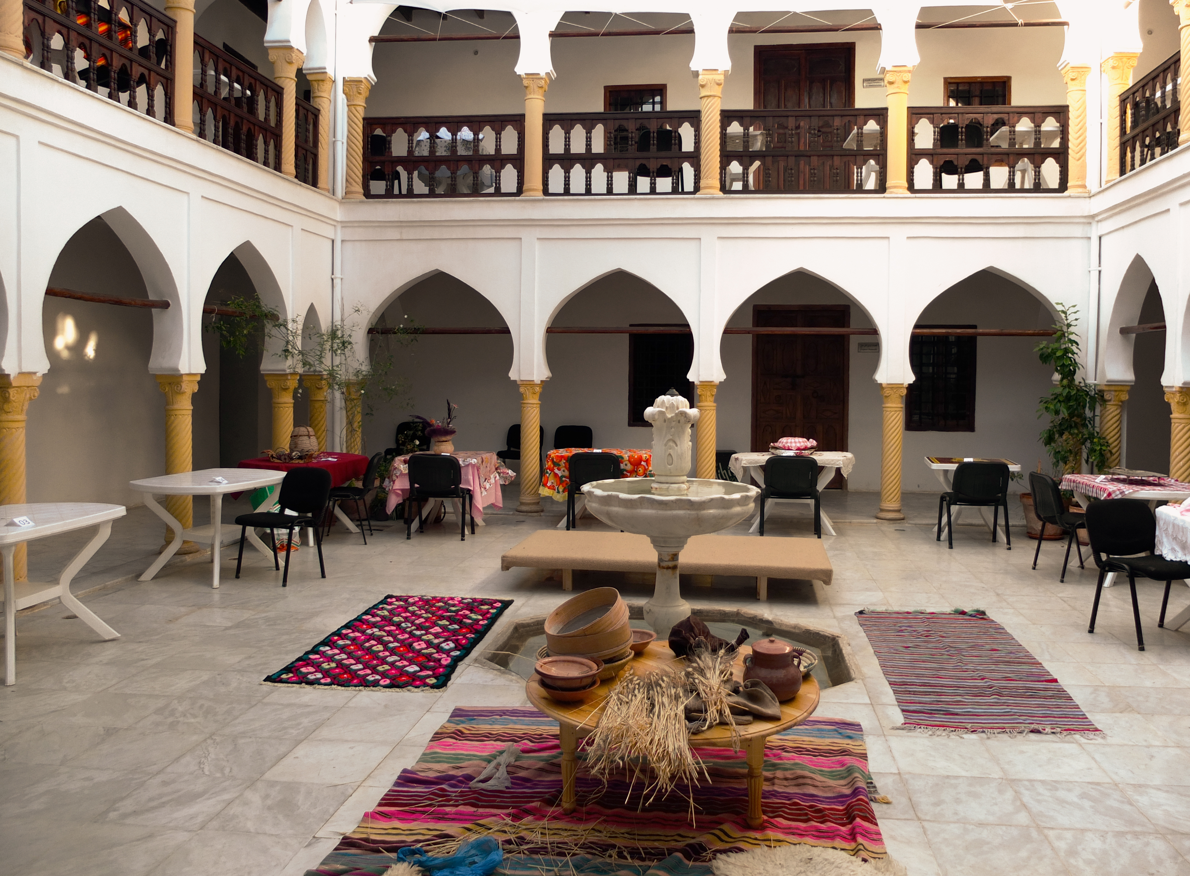 Dar El Bey dénommée Dar EL Emir Abdelkader Mon.Commemor./Mod (Médéa)